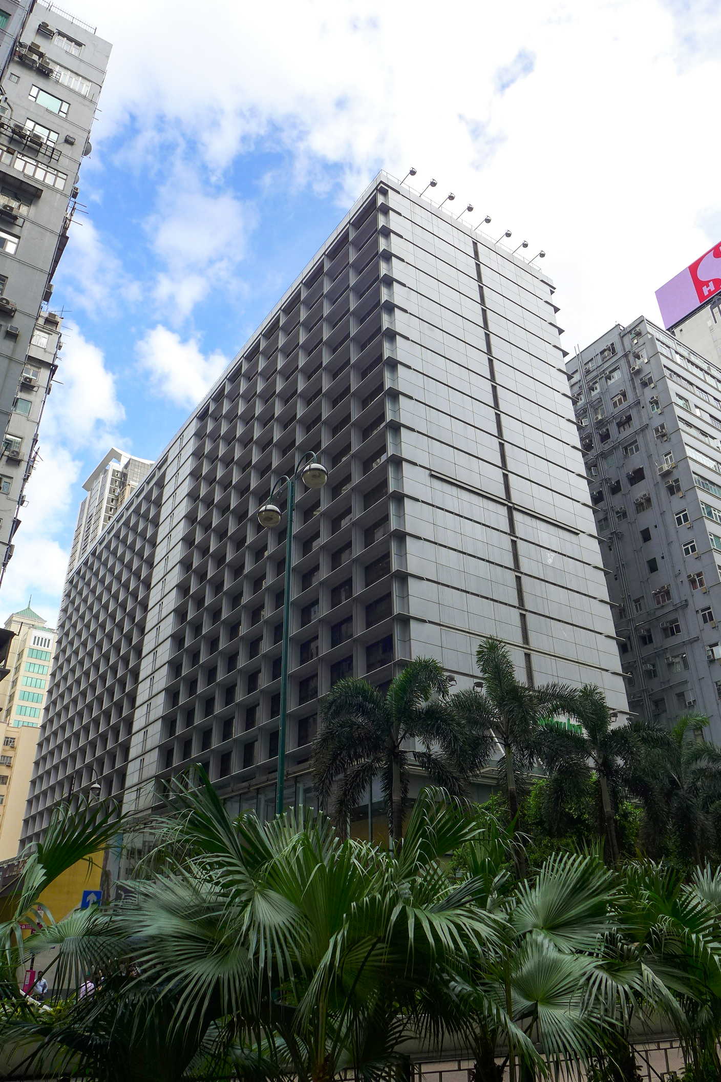 Holiday Inn Golden Mile Hong Kong